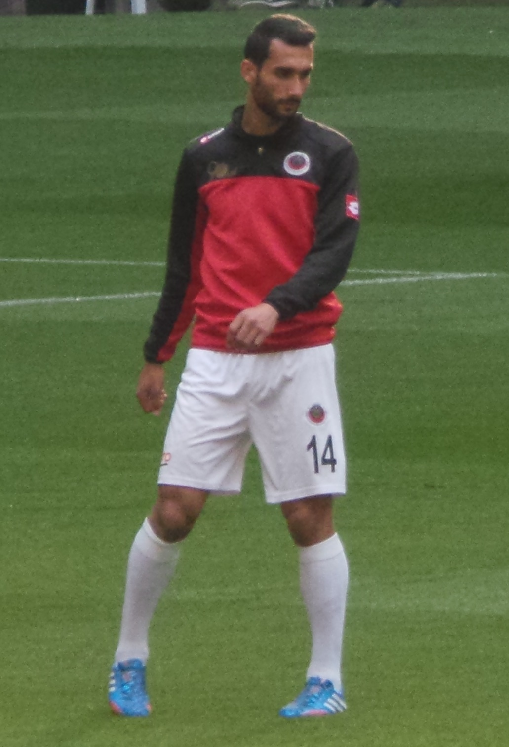 Ferhat Görgülü